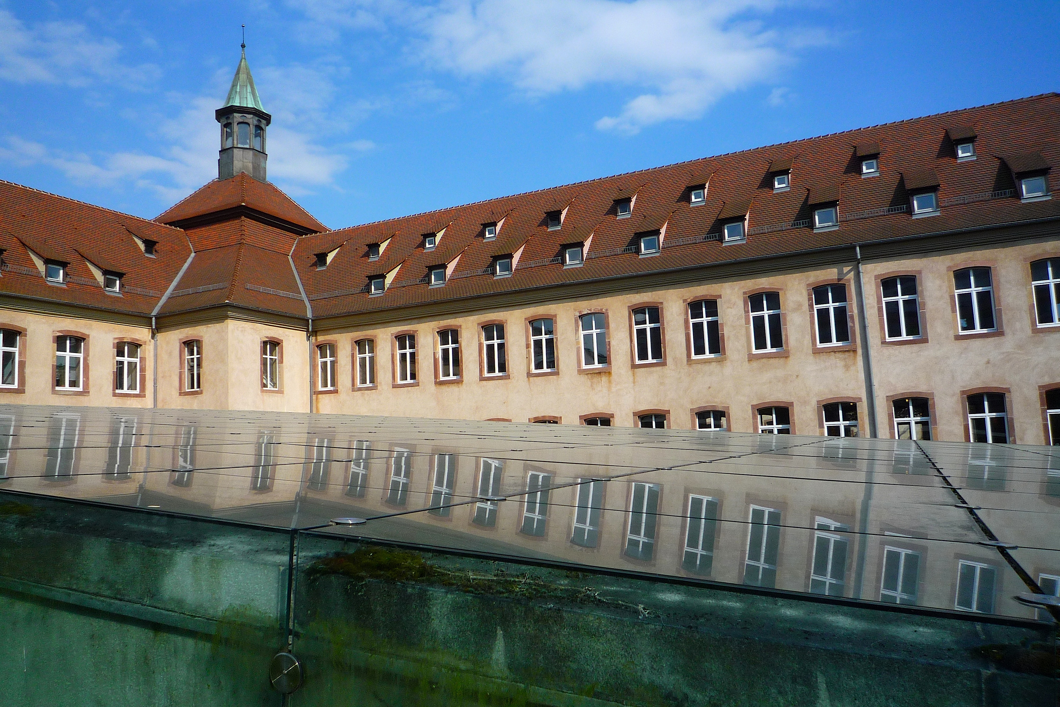 La commanderie des Hospitaliers de Saint-Jean de Jérusalem – dite Commanderie Saint-Jean –, est un bâtiment de la ville de Strasbourg, situé au 1, rue Sainte-Marguerite et dont la construction s’est échelonnée de la première moitié du XVIe siècle à la première moitié du XVIIIe siècle. Il est classé Monument historique depuis 1971. La commanderie fut successivement un lieu de commerce et de diplomatie, un hôpital puis entre 1740 et 1989, la maison d’arrêt Sainte Marguerite. Après restauration et restructuration, elle accueille l’École nationale d’administration (ENA) depuis 1991.